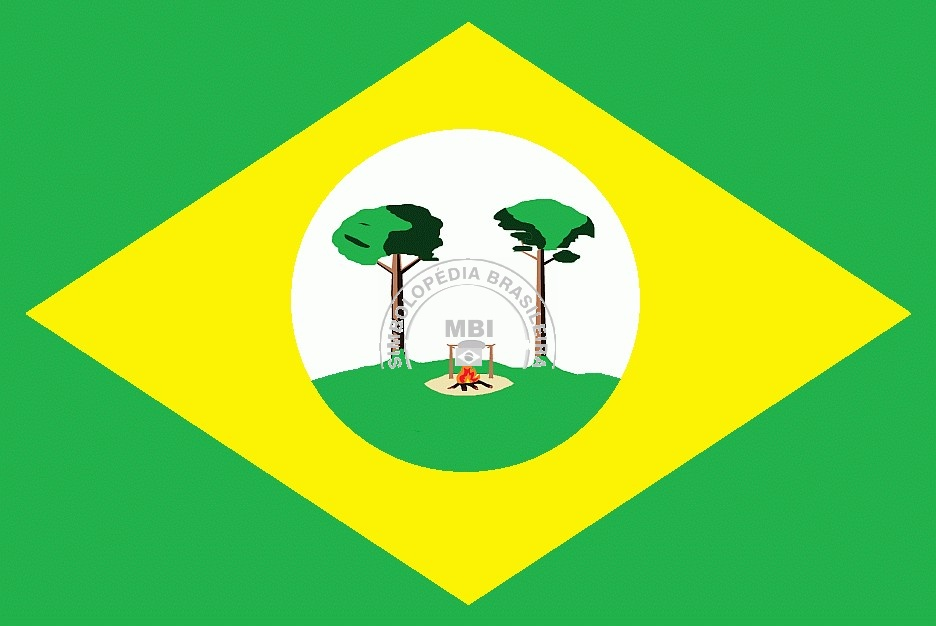 Bandeira do município de Japurá, Amazonas, Brasil.